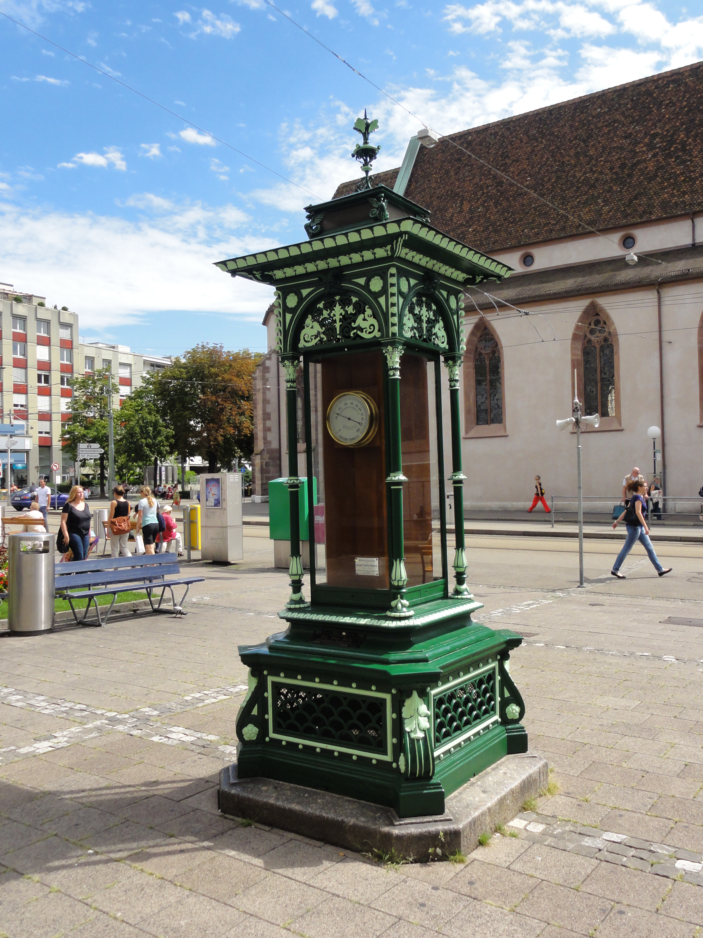 Basel-Claraplatz: Öffentliches Wetterhäuschen